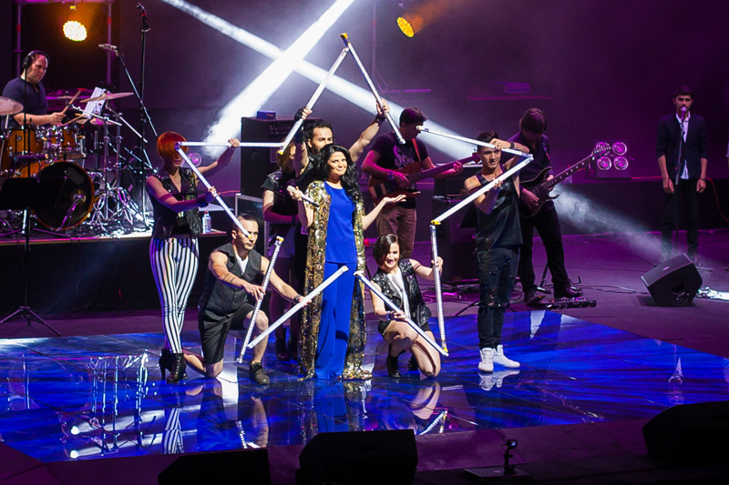 Dinlə - solo konsert